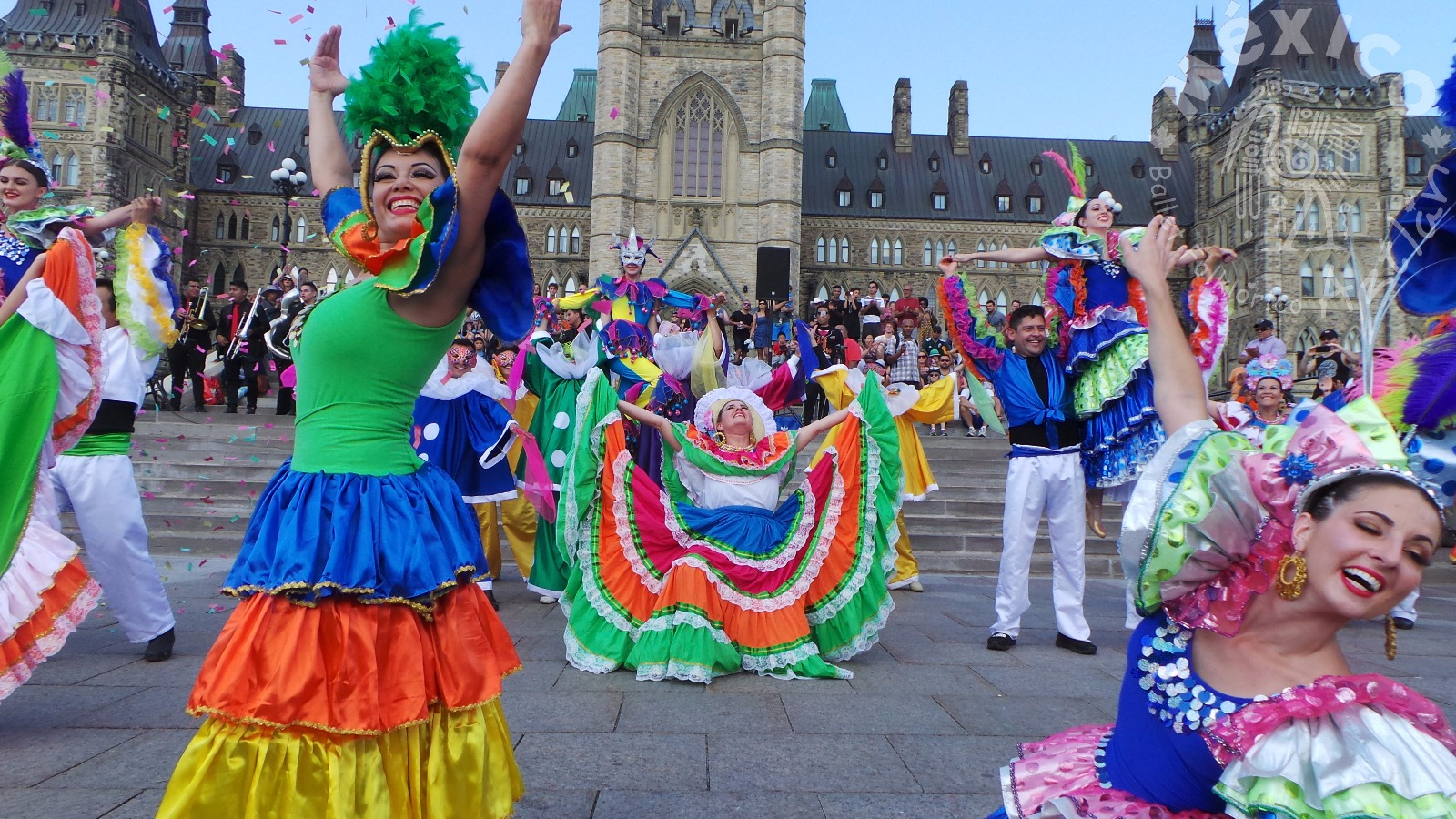 OTtawa